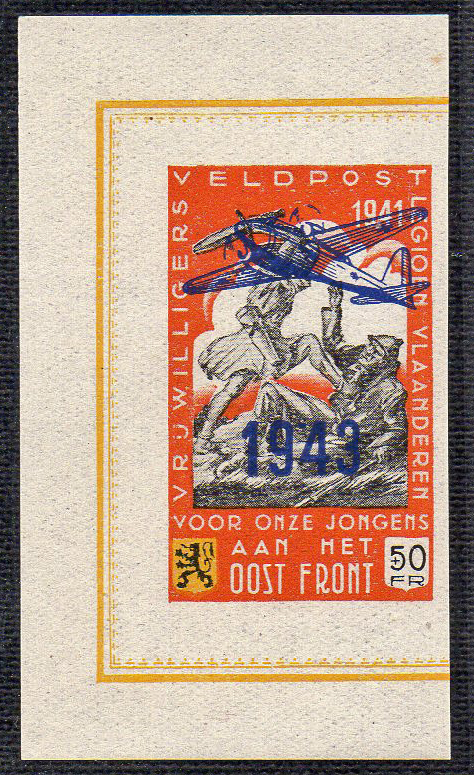 Spendenvignette,"Symbolische Darstellungen" mit farbigem Aufdruck eines Flugzeugs und der Jahreszahl 1943.(= Michel Nr. III U mit Aufdruck); Michel Deutschland Spezial Katalog: Belgien/Flämische Legion Nr. VII U, 1943. Hergestellt in Belgien von Fürsorgeorganisationen für Angehörige der Waffen-SS und Wehrmacht. Unfertige, da ungezähnte Version. Gebilligt von deutschen Behörden und mit Postsendungen als Zusatzfrankatur (grundsätzlich ohne Poststempel) verschickt. Echte Abstempelungen sind nur als sog. "Gefälligkeitsabstempelungen" bekannt.